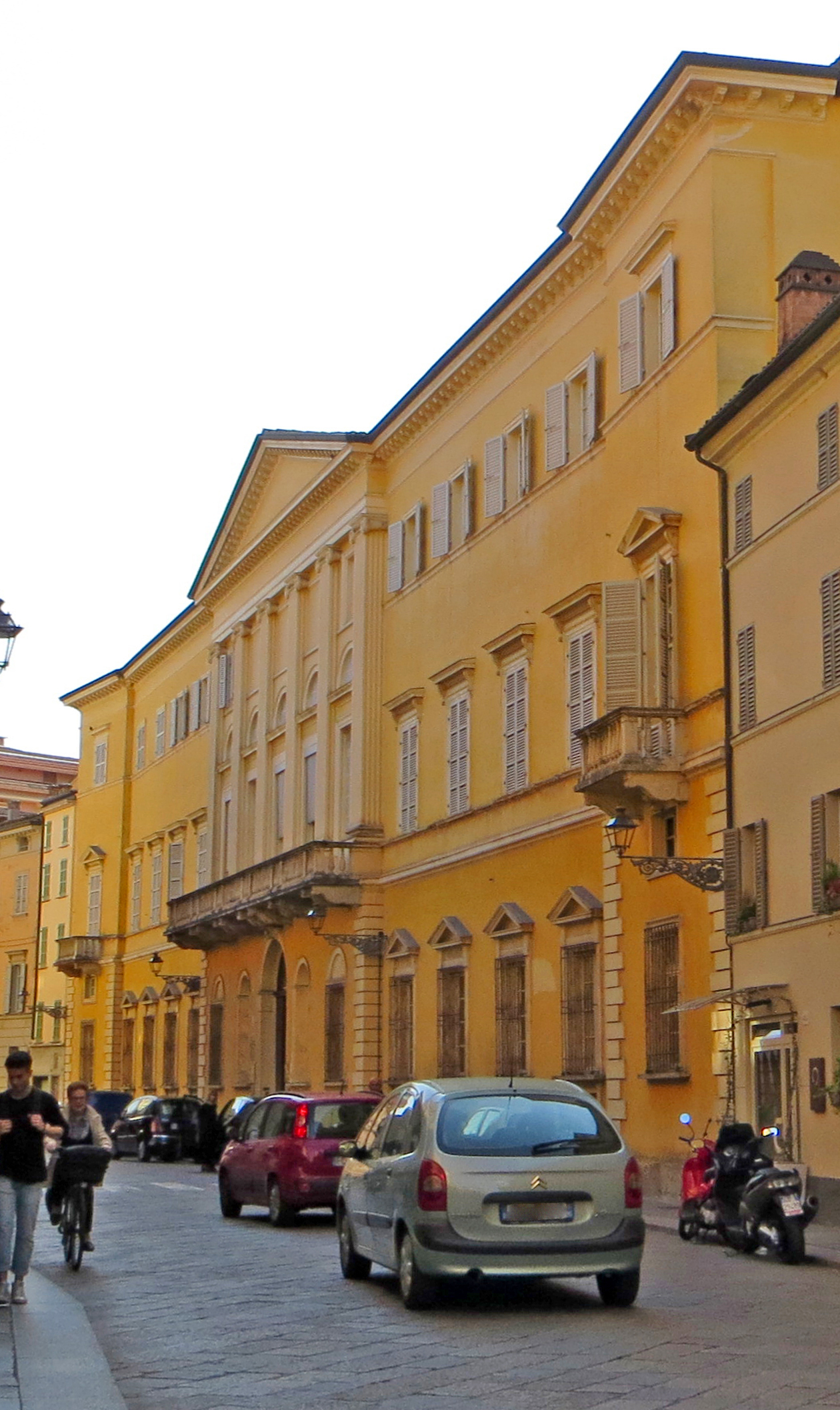 Palazzo Carmi - facciata